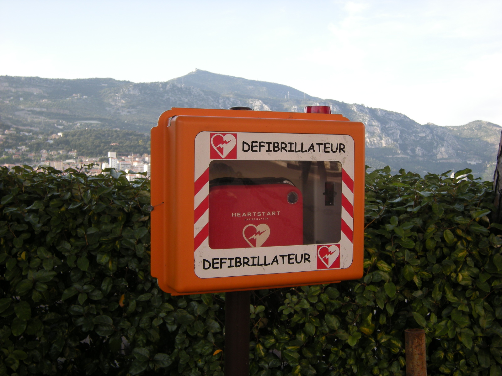 Monte-Carlo